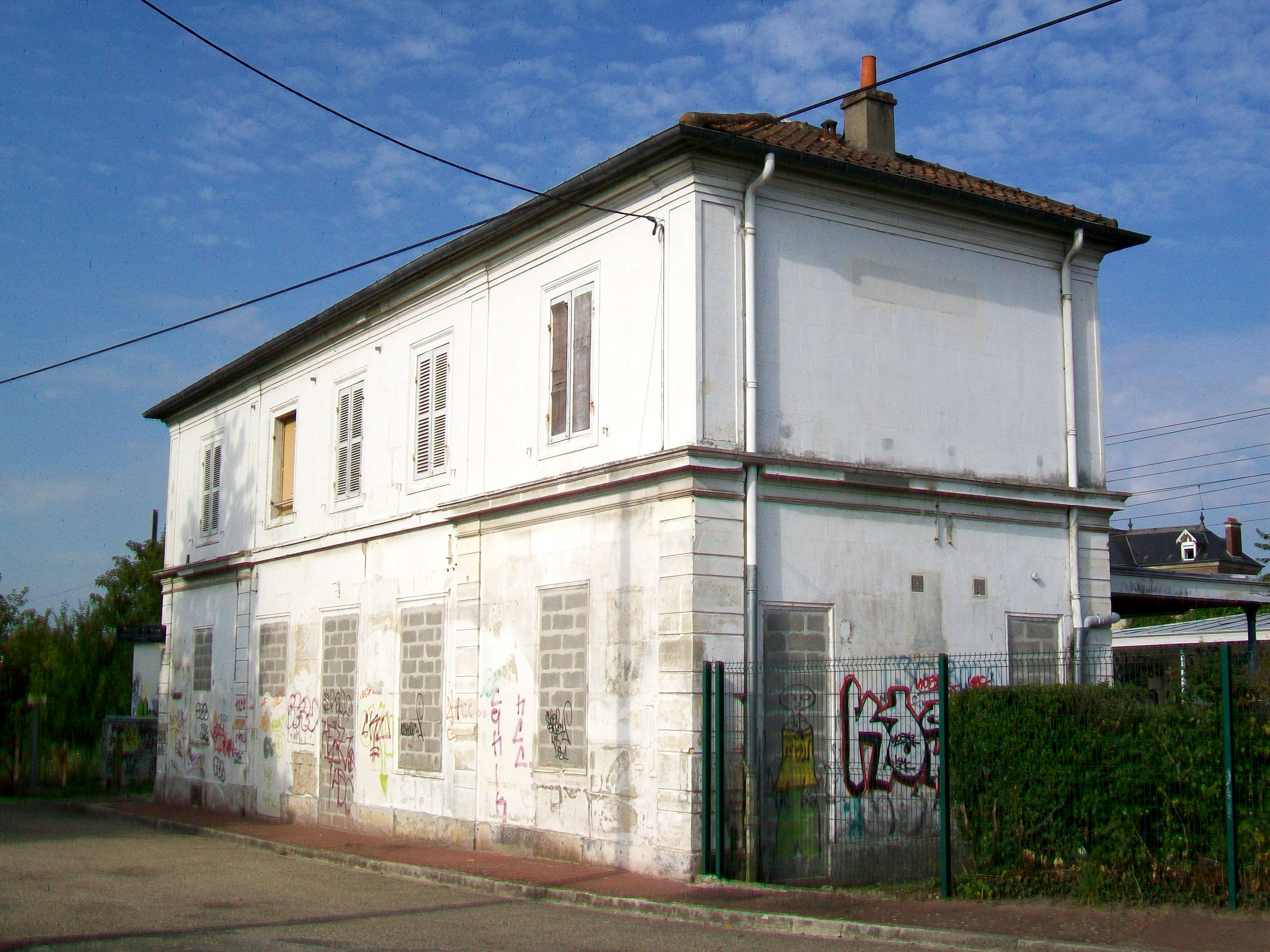 L'ancien bâtiment voyageurs côté cour ; la commune vour le racheter pour le réhabiliter.